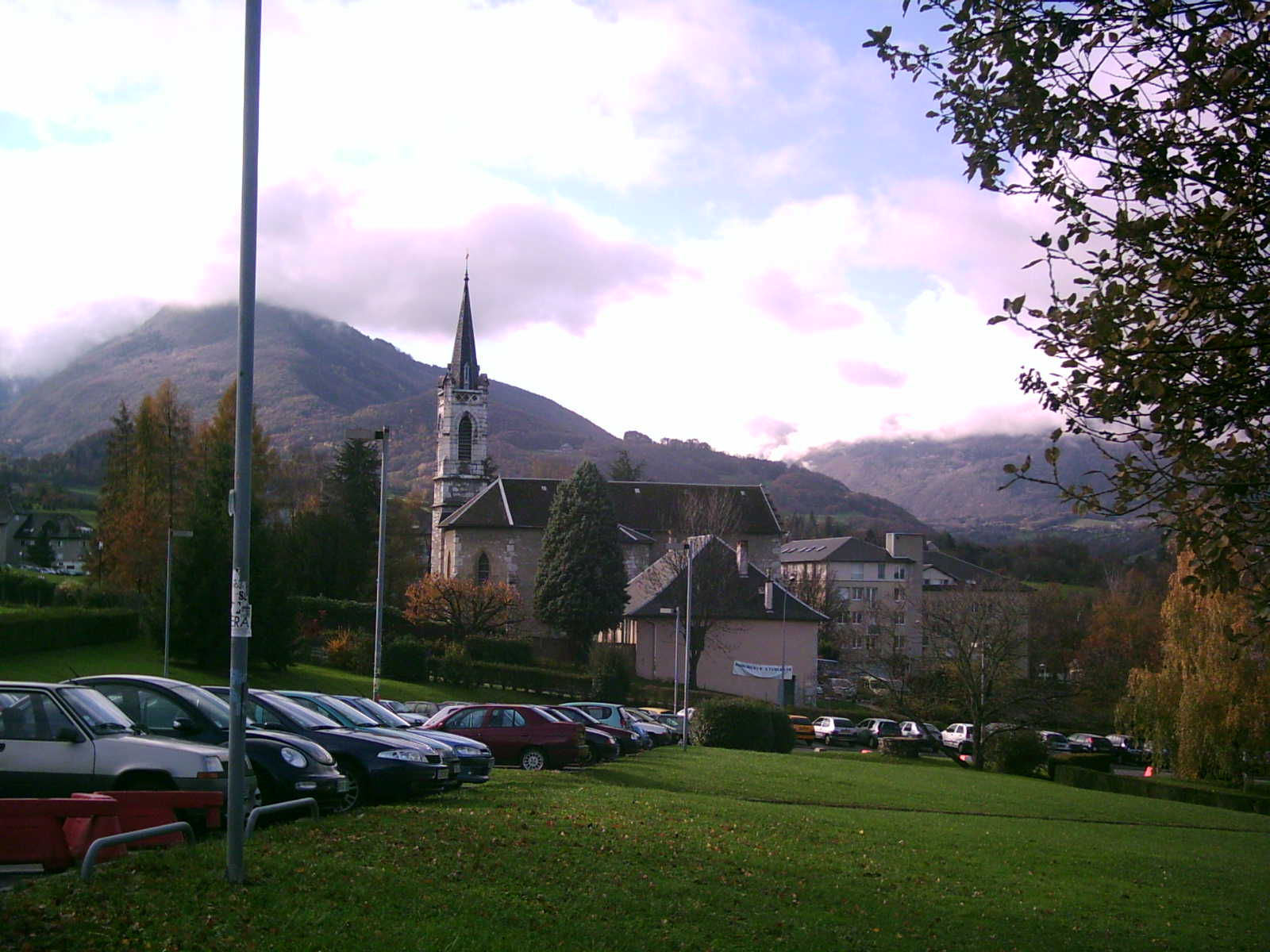 Eglise à Jacob-Bellecombette près de l'Université de Chambéry (Université de Savoie), novembre 2006.